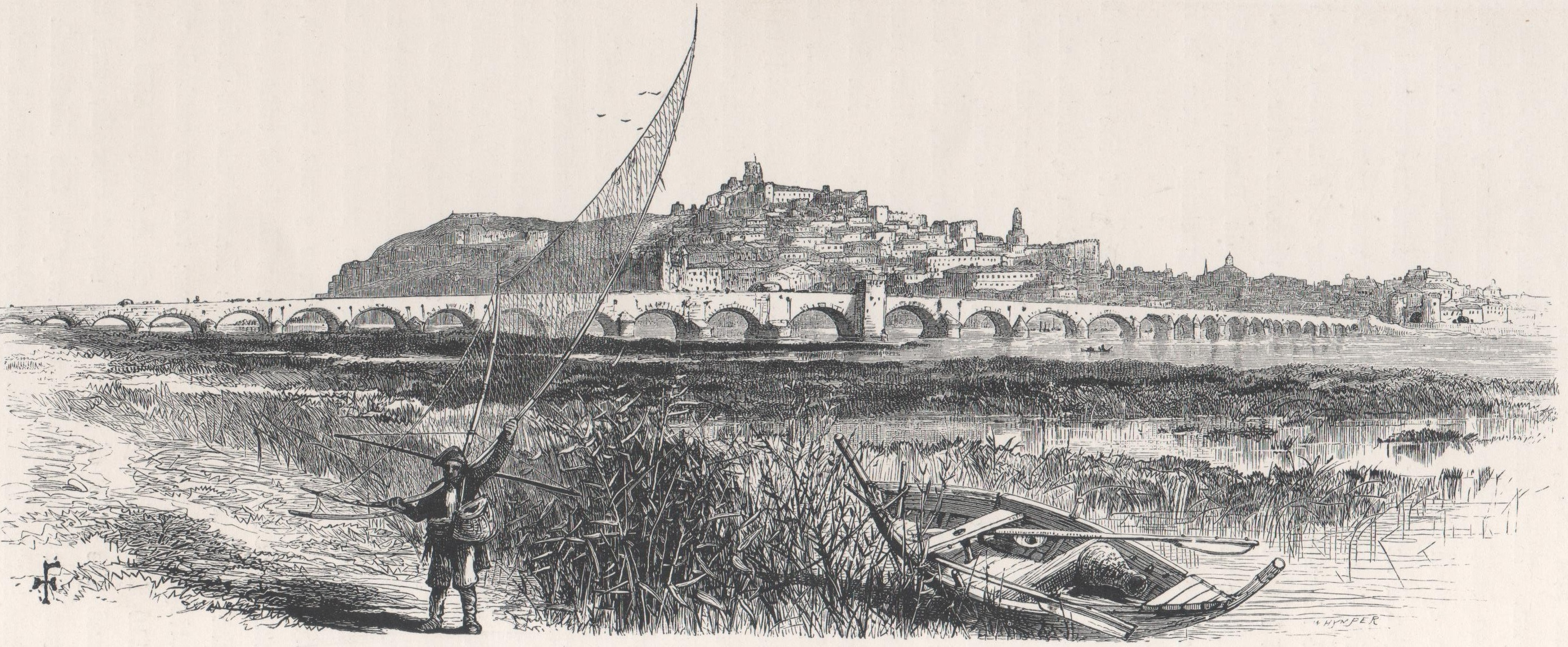 Xilografía hacia 1880 de un dibujo de Harry Fenn que procede de la obra, Picturesque Europe